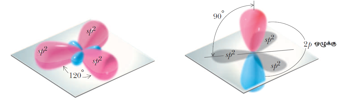 sp2 கலப்பு.